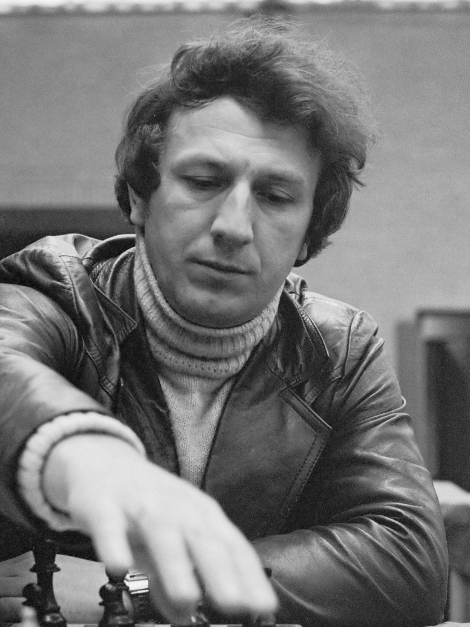 Jevgeni Svesjnikov in actie op het Hoogovenstoernooi 20 januari 1981